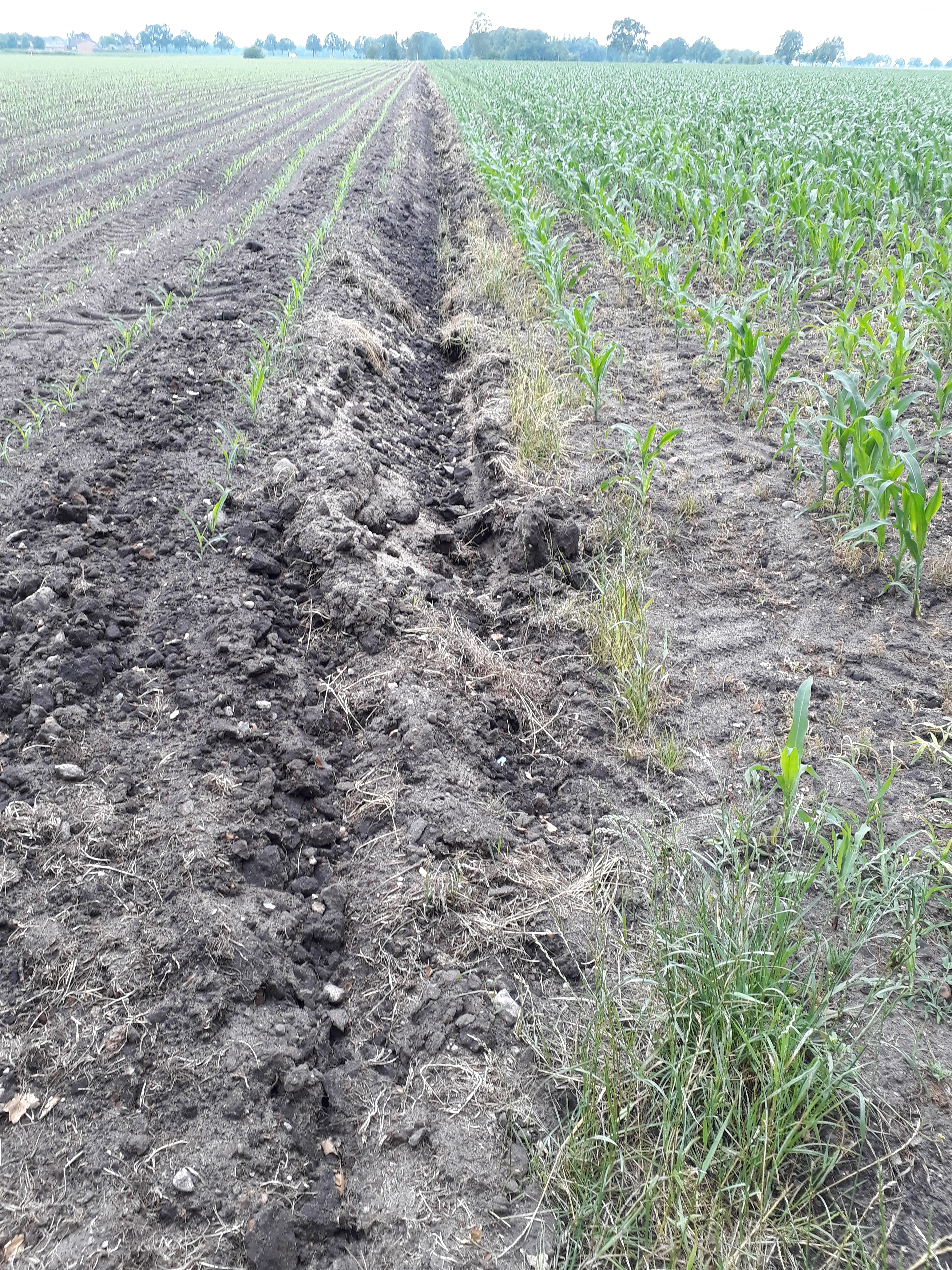 Aue-Quelle bei Ahrensmoor-Nord am Feldweg zwischen Ahlerstedt und Ahrensmoor-Nord am NSG Braken.